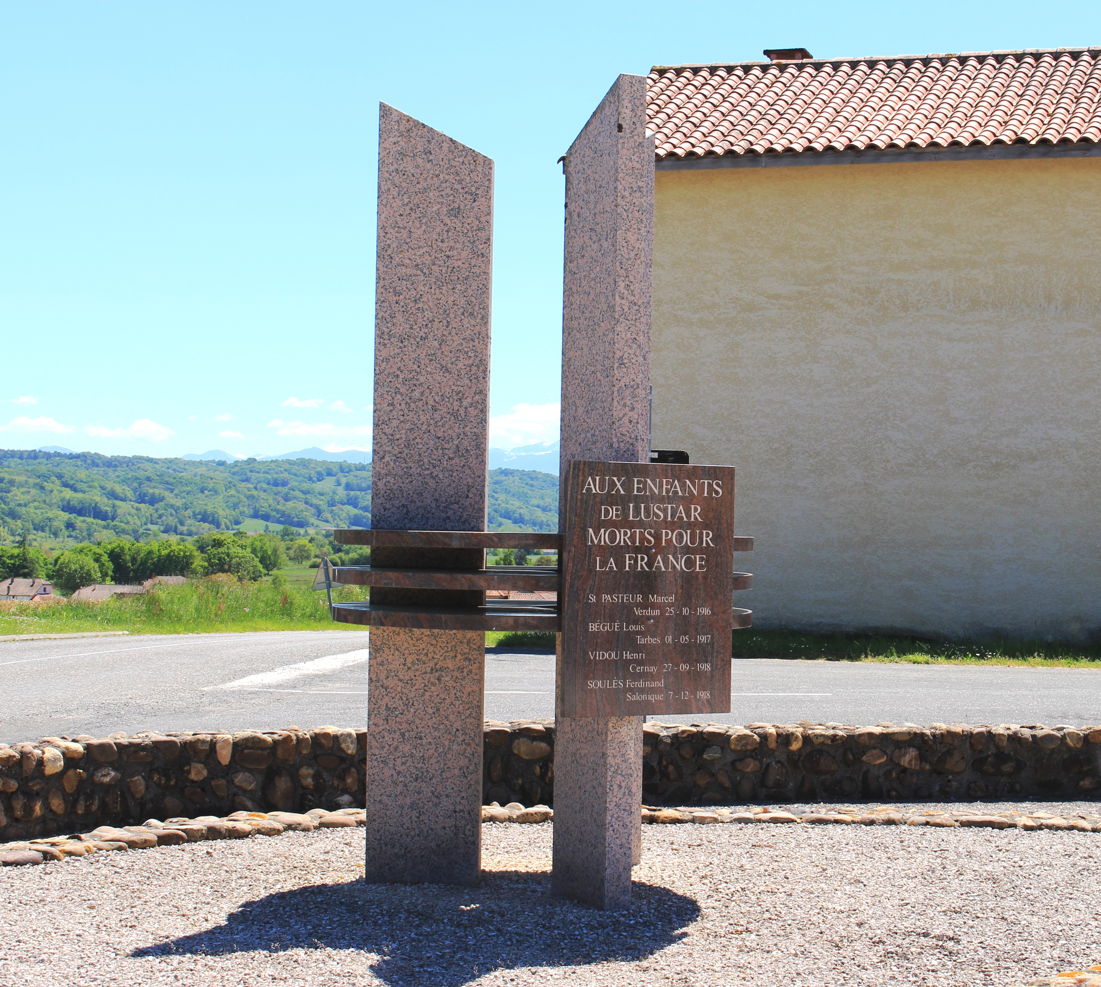 Monument aux morts de Lustar (Hautes-Pyrénées)